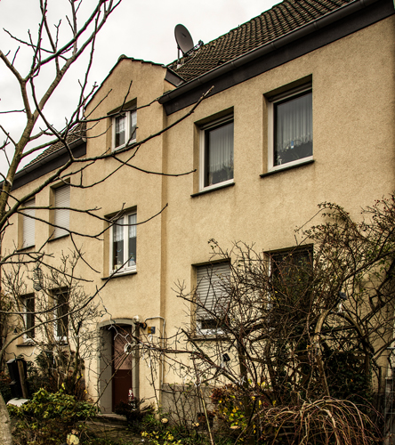 Wohnhaus von Gustav Lichtenstein